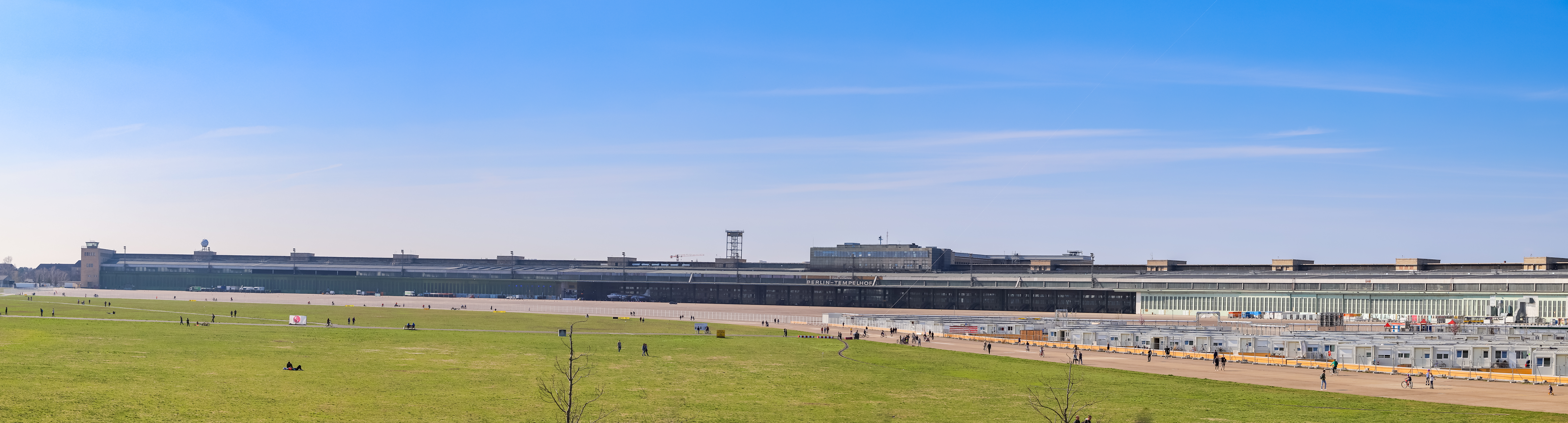 Flughafen Tempelhof Pano Berlin